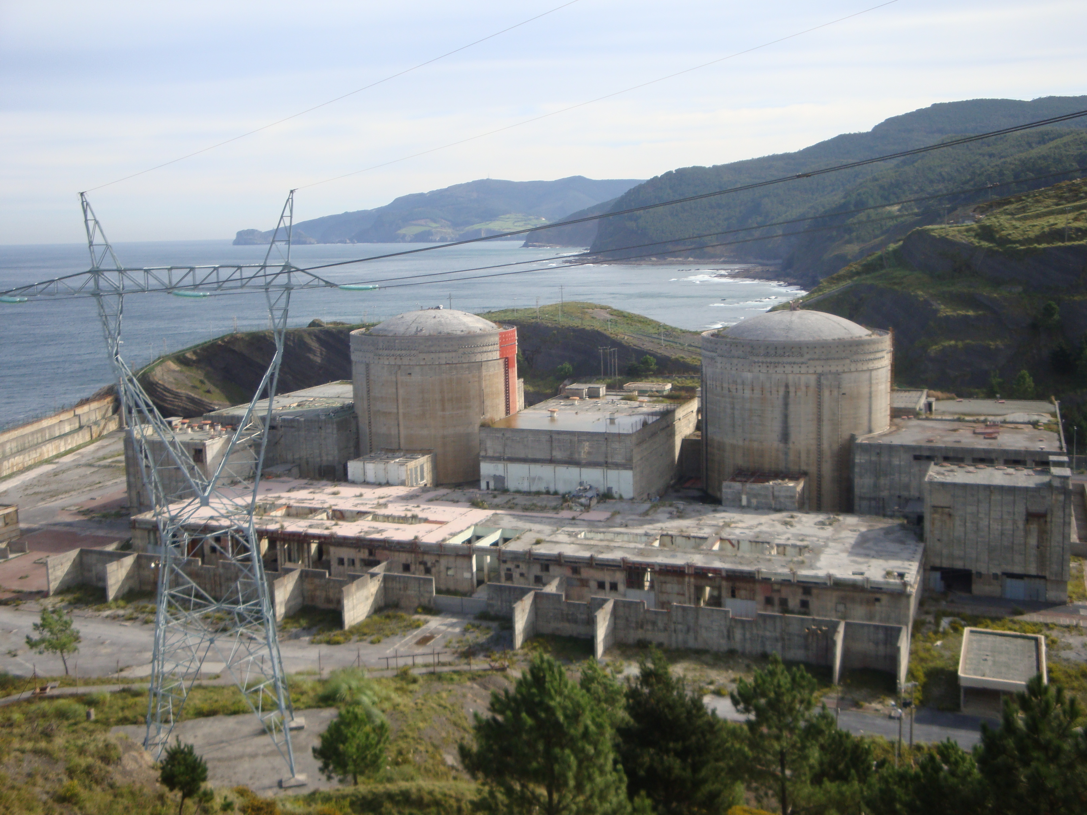 Central nuclear de Lemóniz abandonada en su ejecución por atentados terroristas de ETA